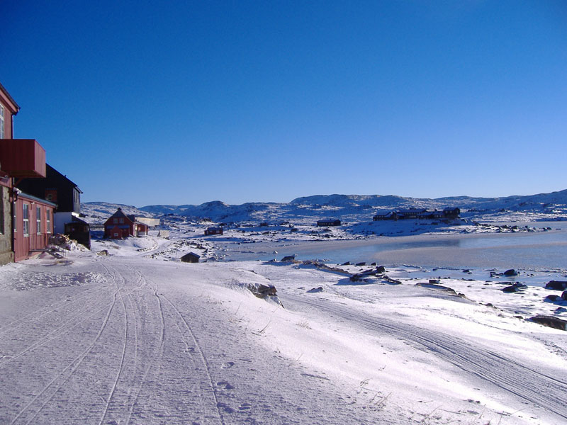 Norway, Finse, Winter, Finsevatnet, Finsehytta